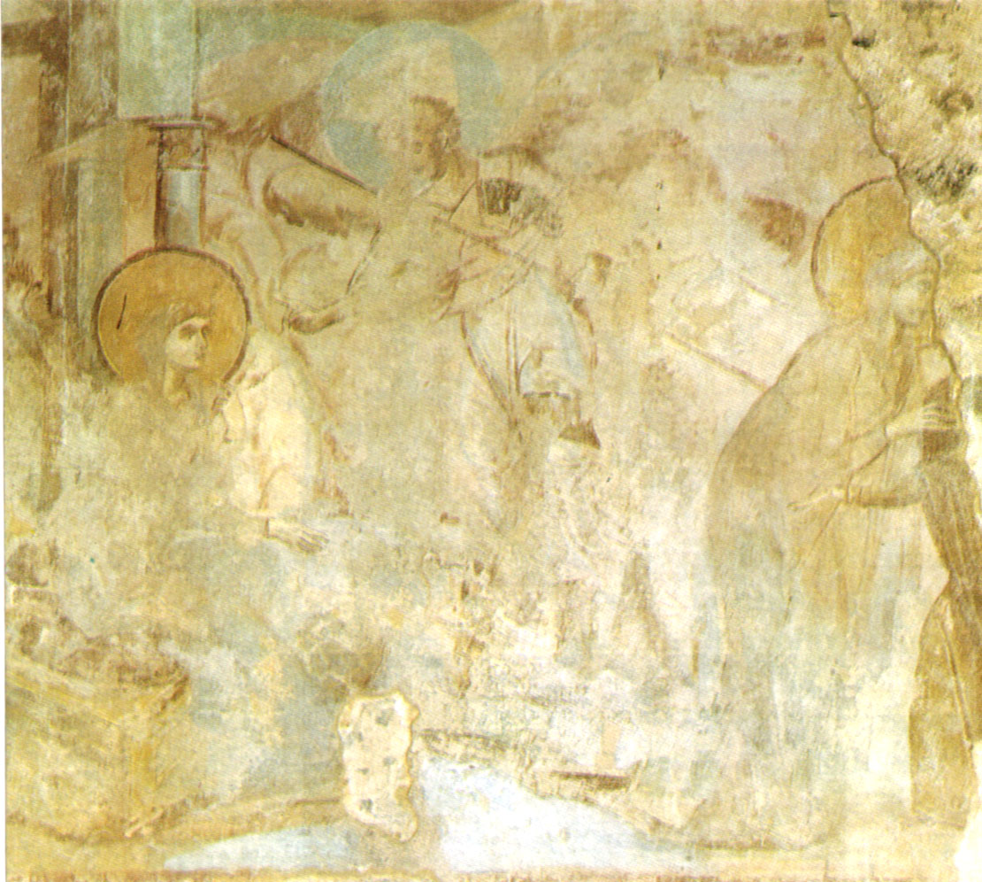 Maestro di castelseprio, annunciazione e visitazione